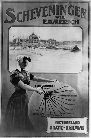 Afbeelding van een affiche van de N.S. voor treinverbindingen vanuit diverse Europese steden naar Scheveningen, via Emmerich, met een vrouw in klederdracht en het Kurhaus met pier te Scheveningen.